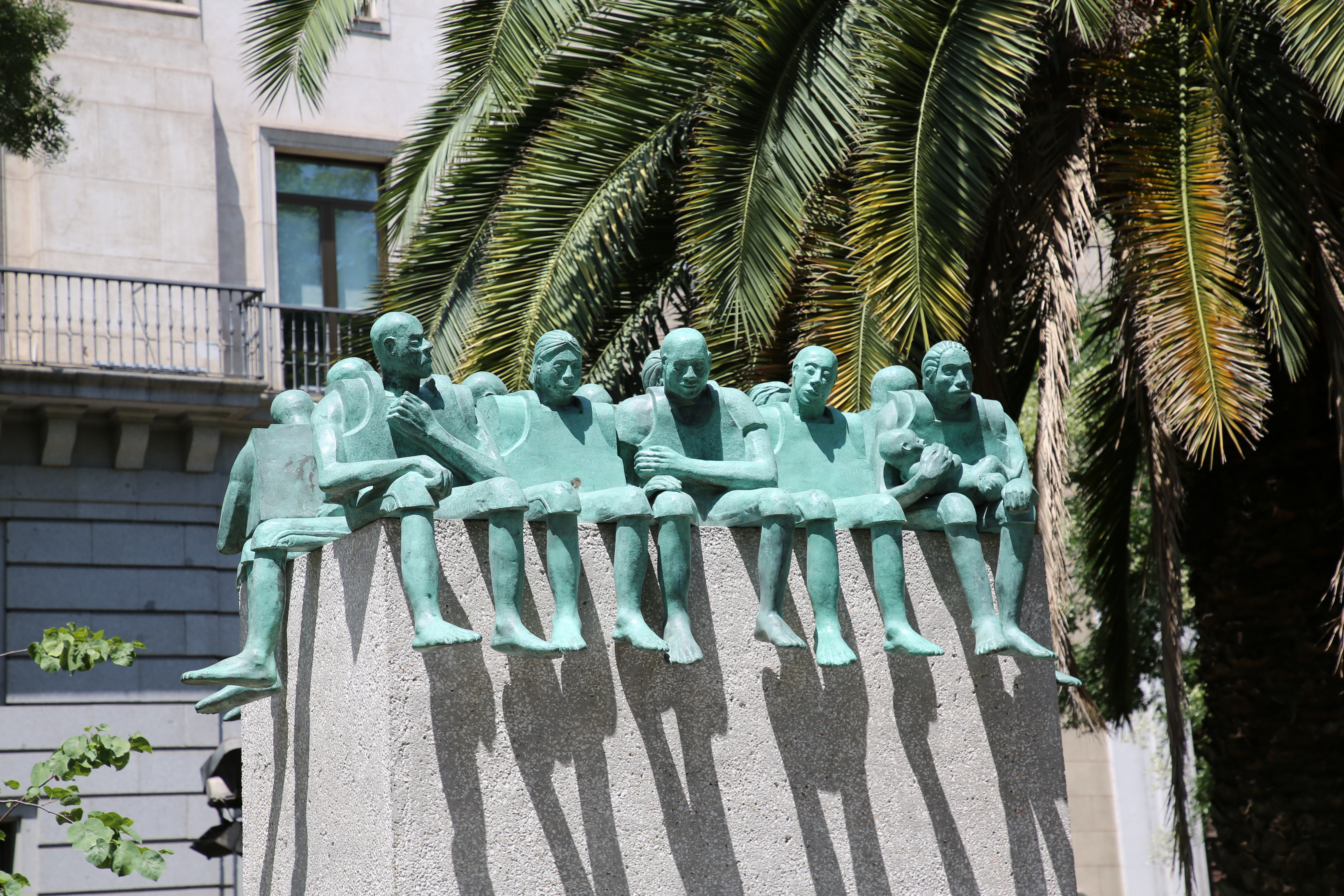 Refugiados, escultura de Bel Borba en el paseo de Recoletos de Madrid